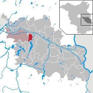 Rauen in Brandenburg (Country) - District Oder-Spree